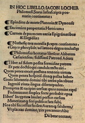 In Hoc Libello Iacobi Locher Philomusi Sueui Infrascripta poematia ..., 1513, Jakob Locher (1470-1528)